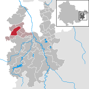 Münchenbernsdorf in Thuringia - District Greiz